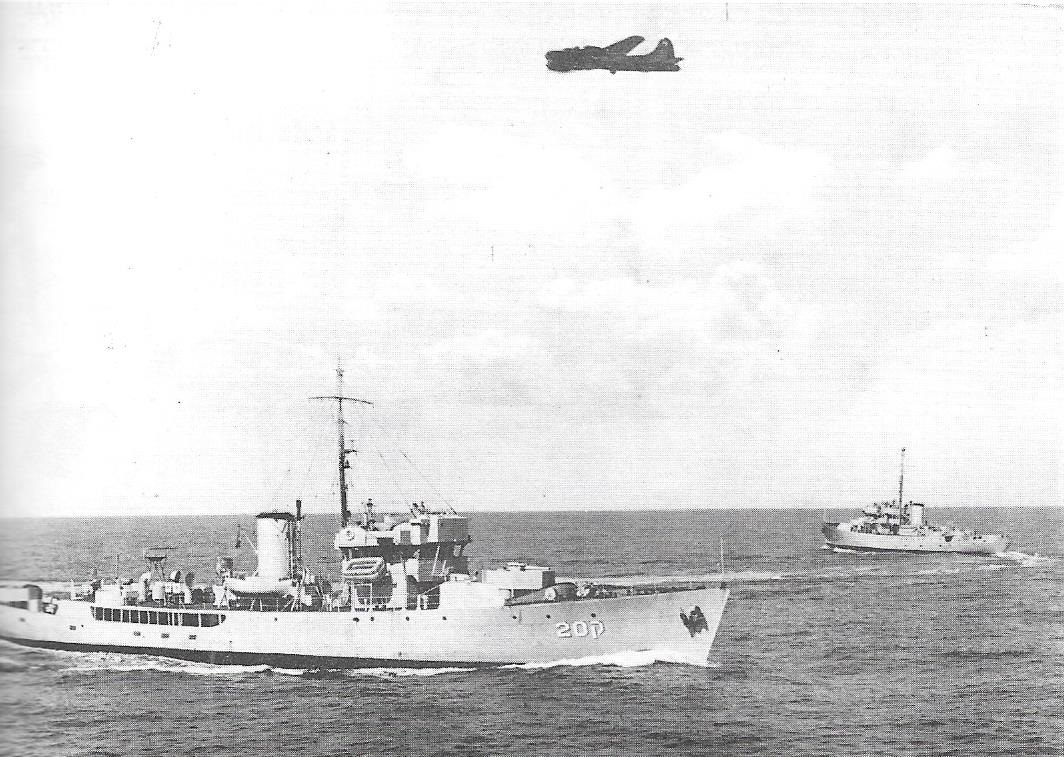 הקורטה אח"י הגנה מאחור אח"י מעוז ומעליהן מטוס B-17 של חיל האוויר הישראלי.